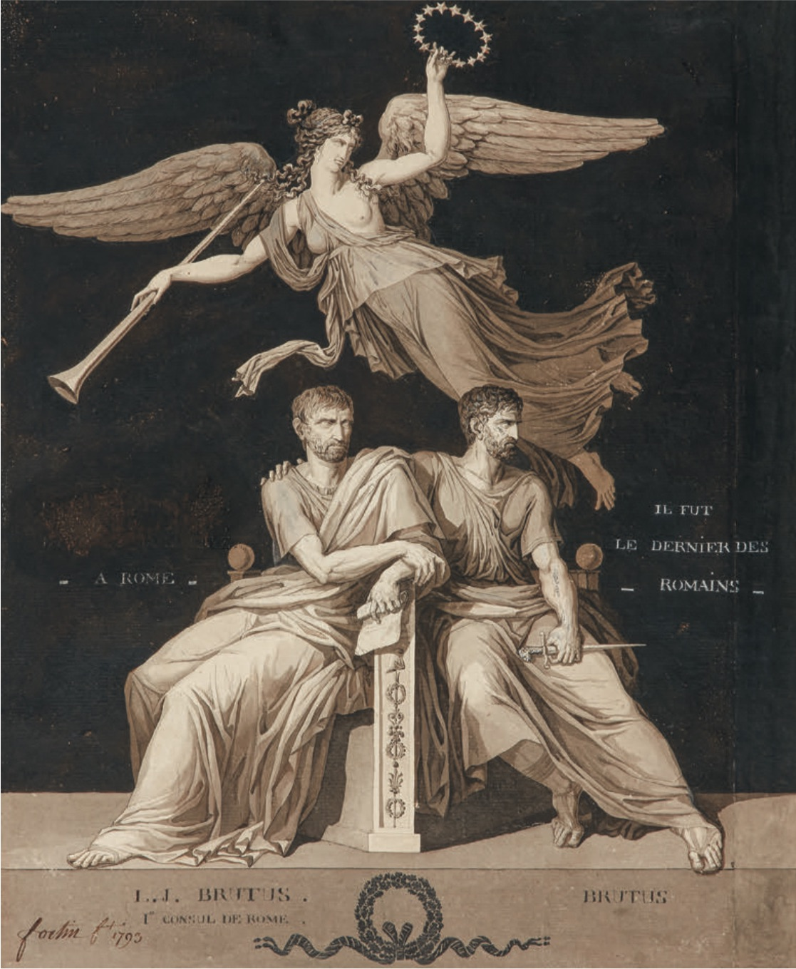 Augustin Félix Fortin (1763-1832) Les deux Brutus survolés par la Renommée Plume et encre noire, lavis noir et brun et rehauts de gouache blanche - 37,5 x 30,5 cm Paris, collection Prat Photo : Catalogue de l’exposition